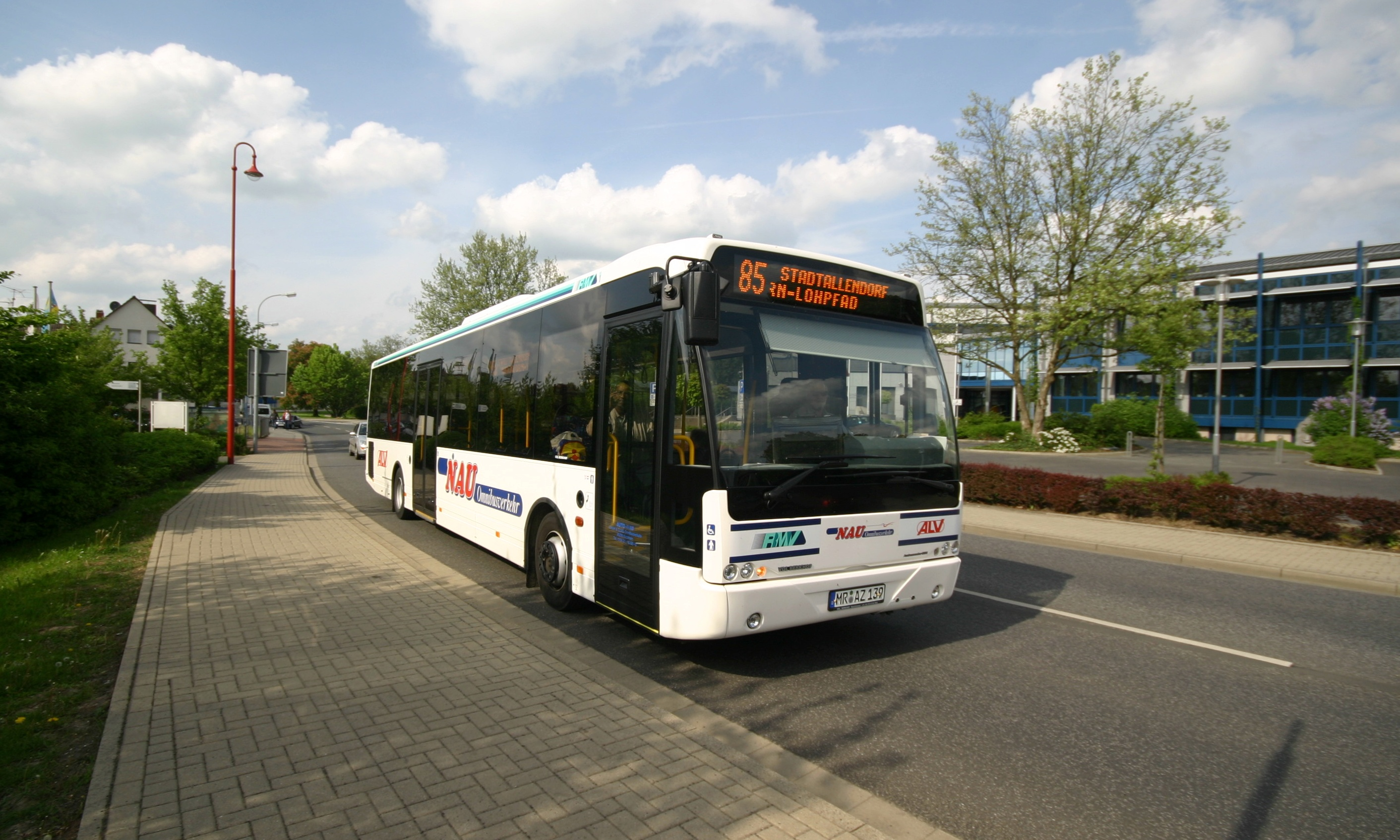 Stadtbus der Linie 85 am Rathaus.